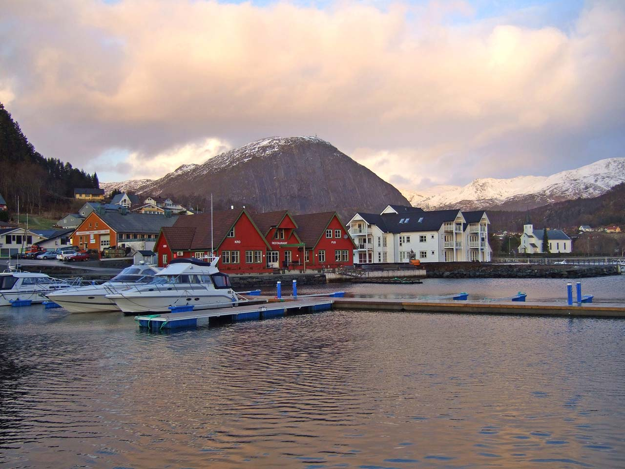 Fuji F30